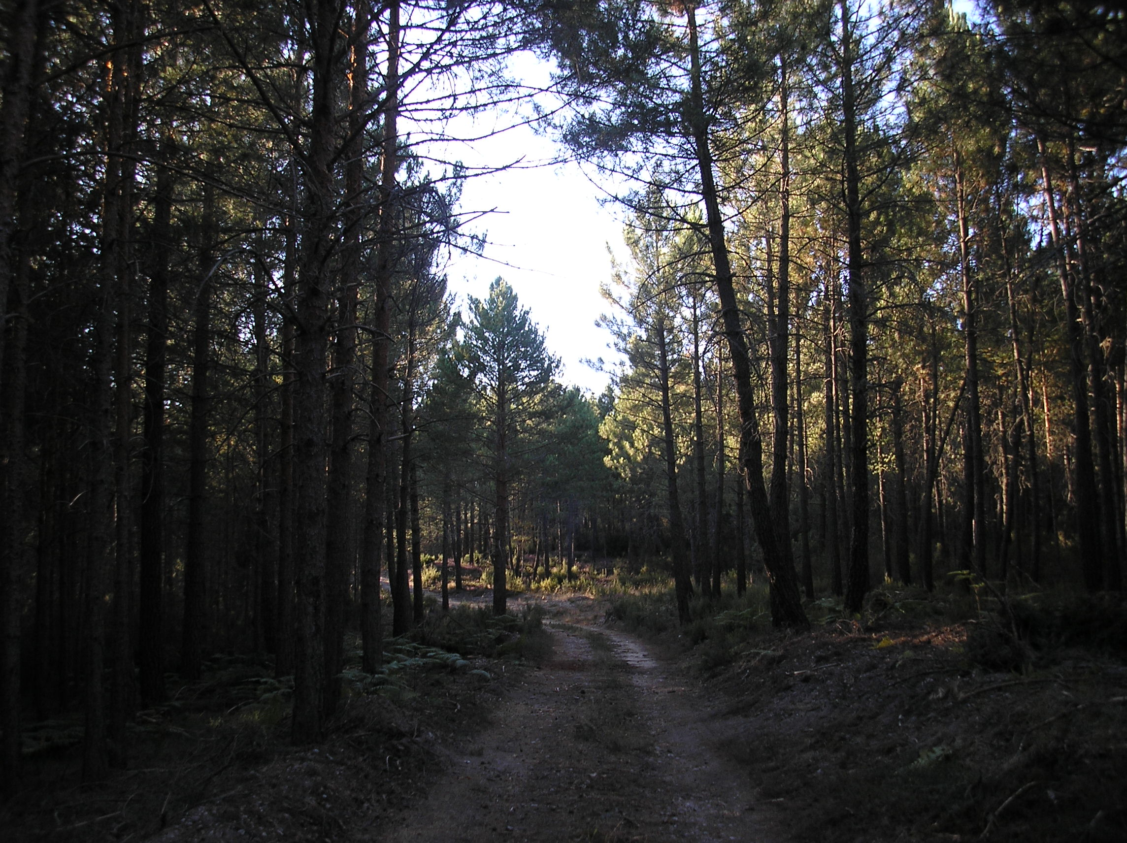 Navaleno.Pinares